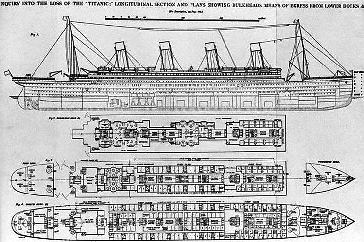 RMS Titanic